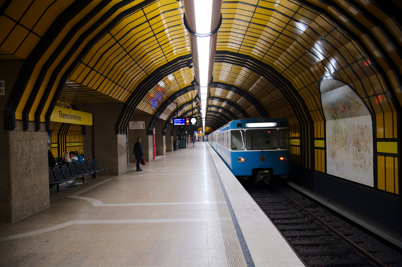 Ausfahrender A-Wagen Richtung Hauptbahnhof